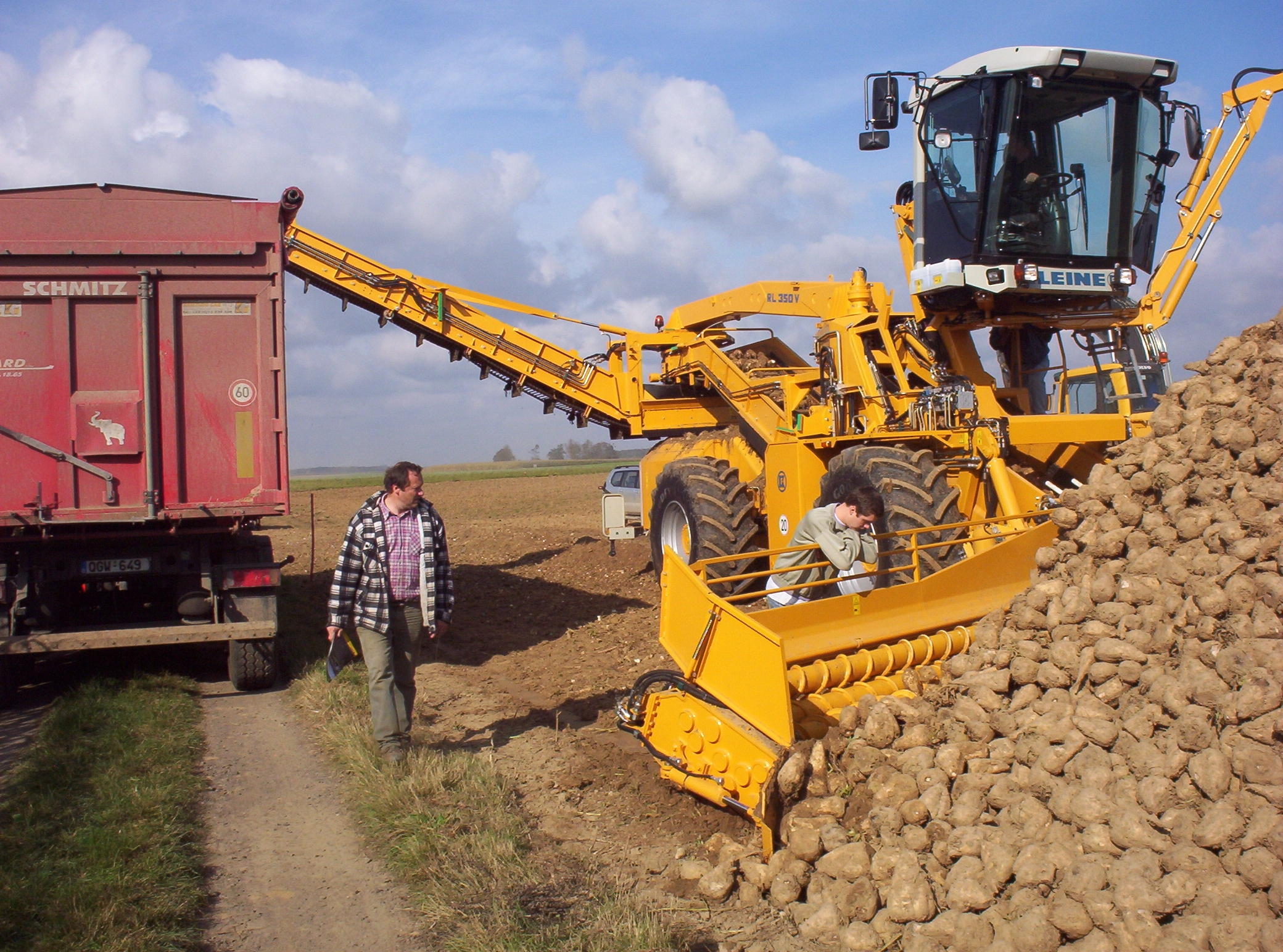 „Rübenmaus“ beim Verladen von Zuckerrüben – Rüben-Reinigungs- und Verlademaschine RL 350 V der deutschen Firma Franz Kleine im Einsatz bei Tienen in Belgien